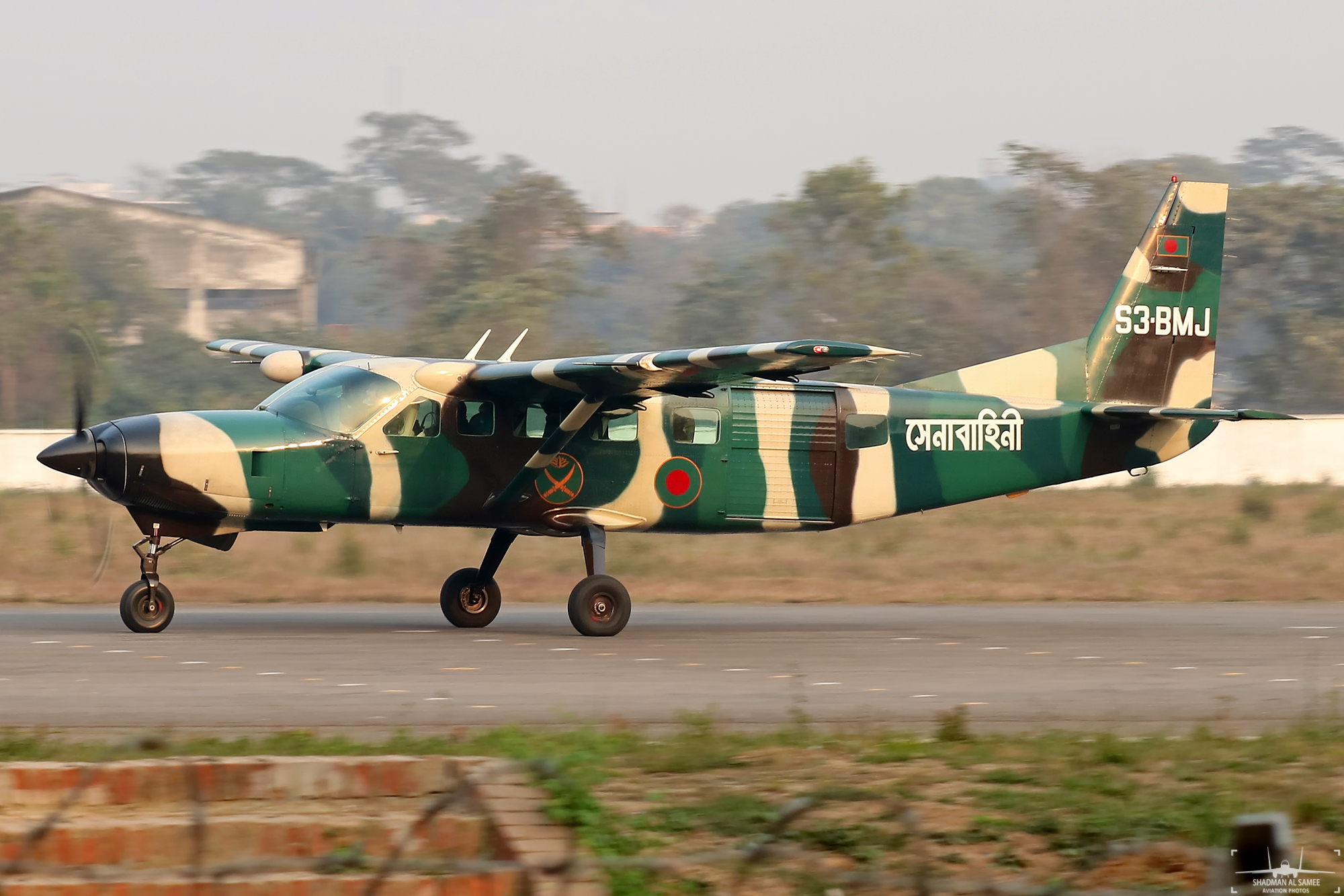 VGTJ 2018.